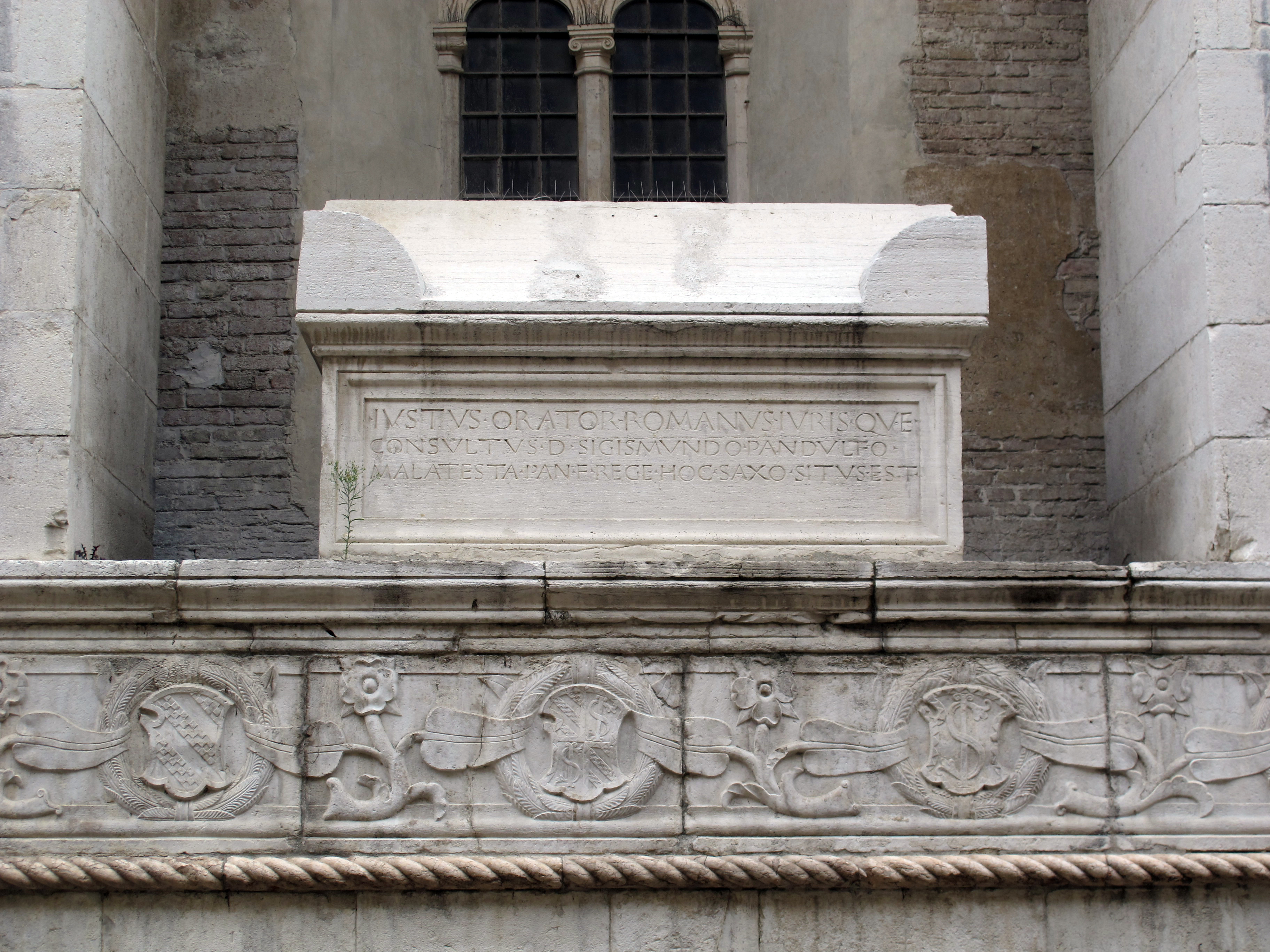 Tempio Malatestiano - MIBAC This is a photo of a monument which is part of cultural heritage of Italy.